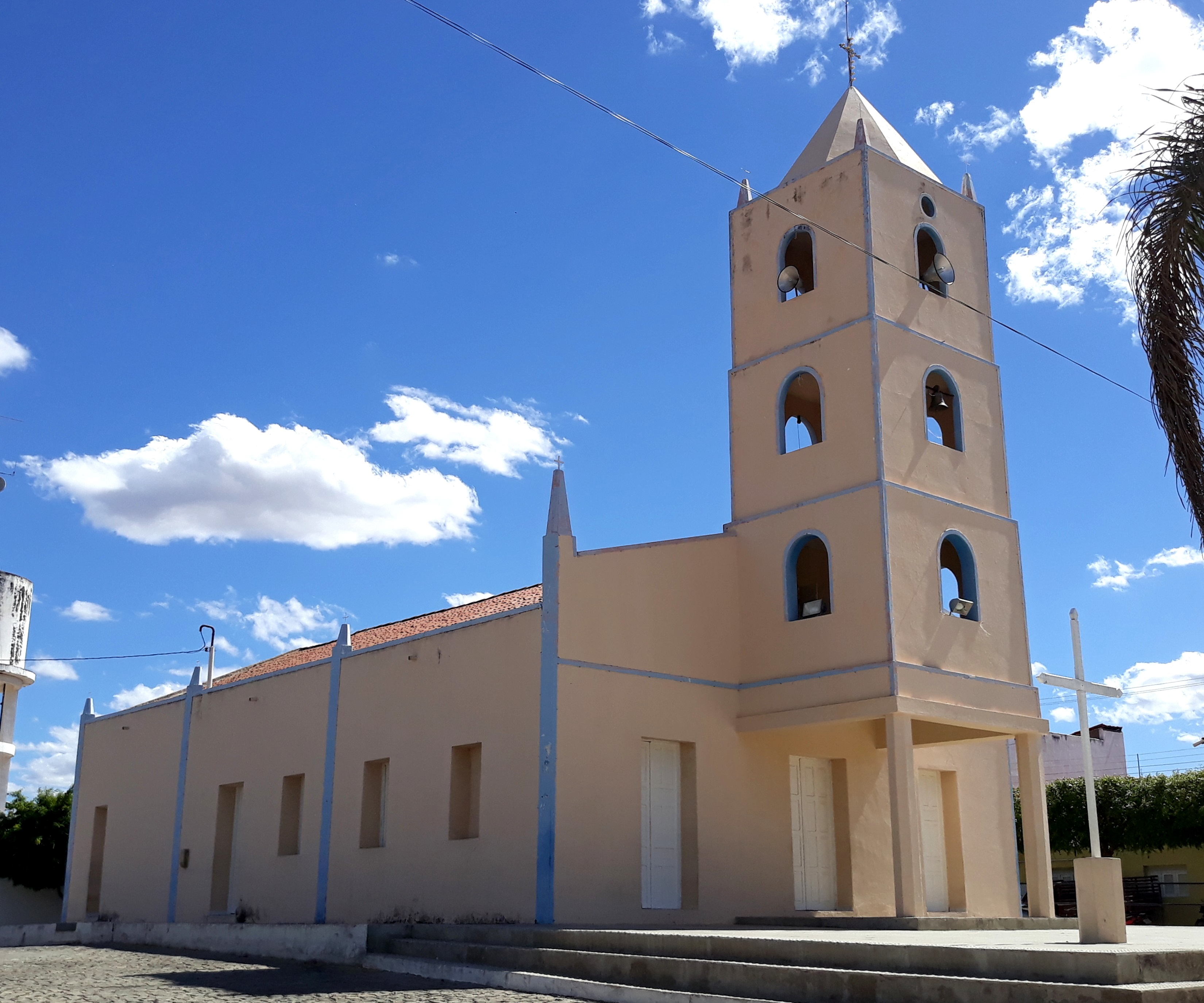 Capela de Nossa Senhora do Perpétuo Socorro, da paróquia de Alexandria, em Pilões, Rio Grande do Norte (Brasil).